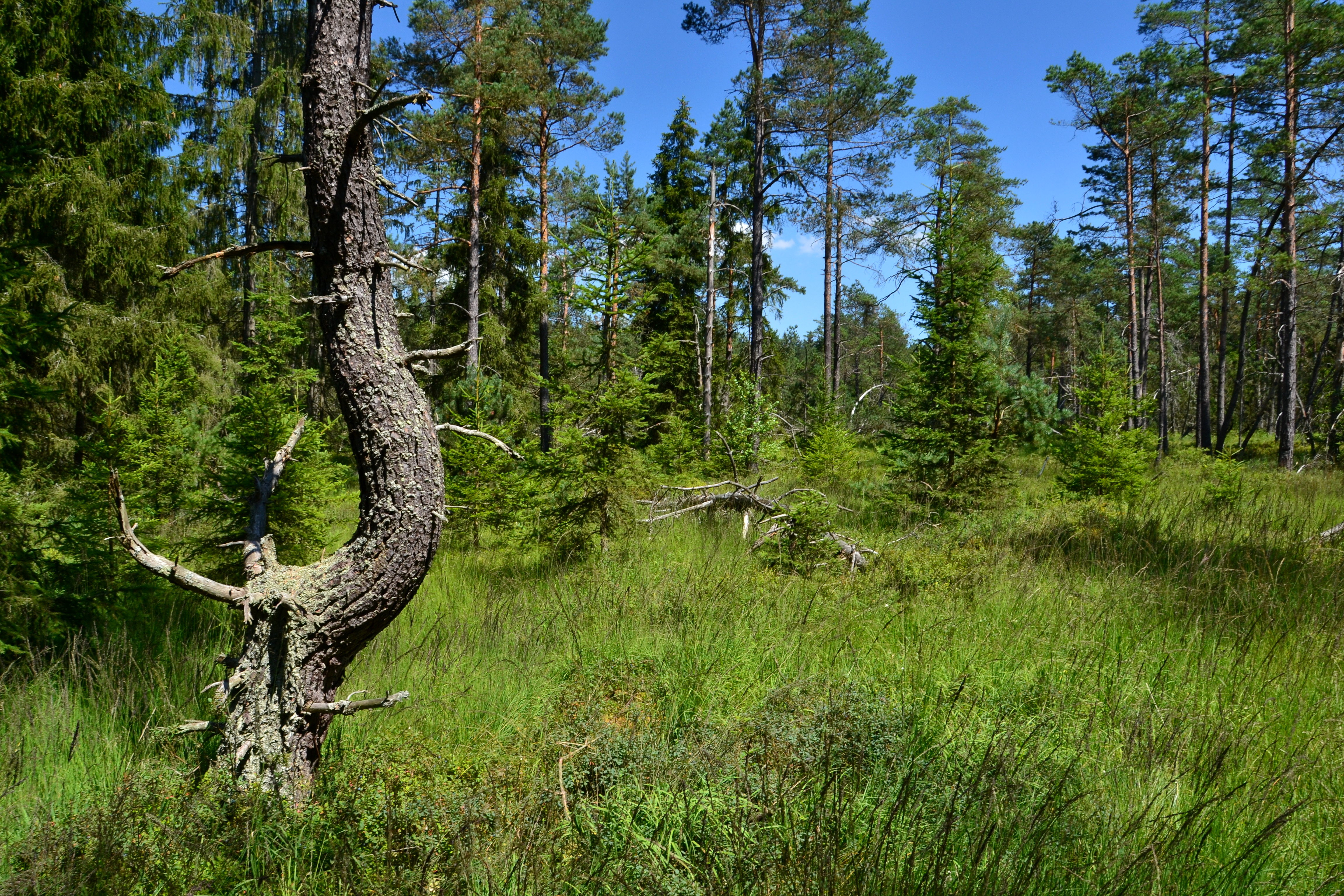 PP Multerberské rašeliniště